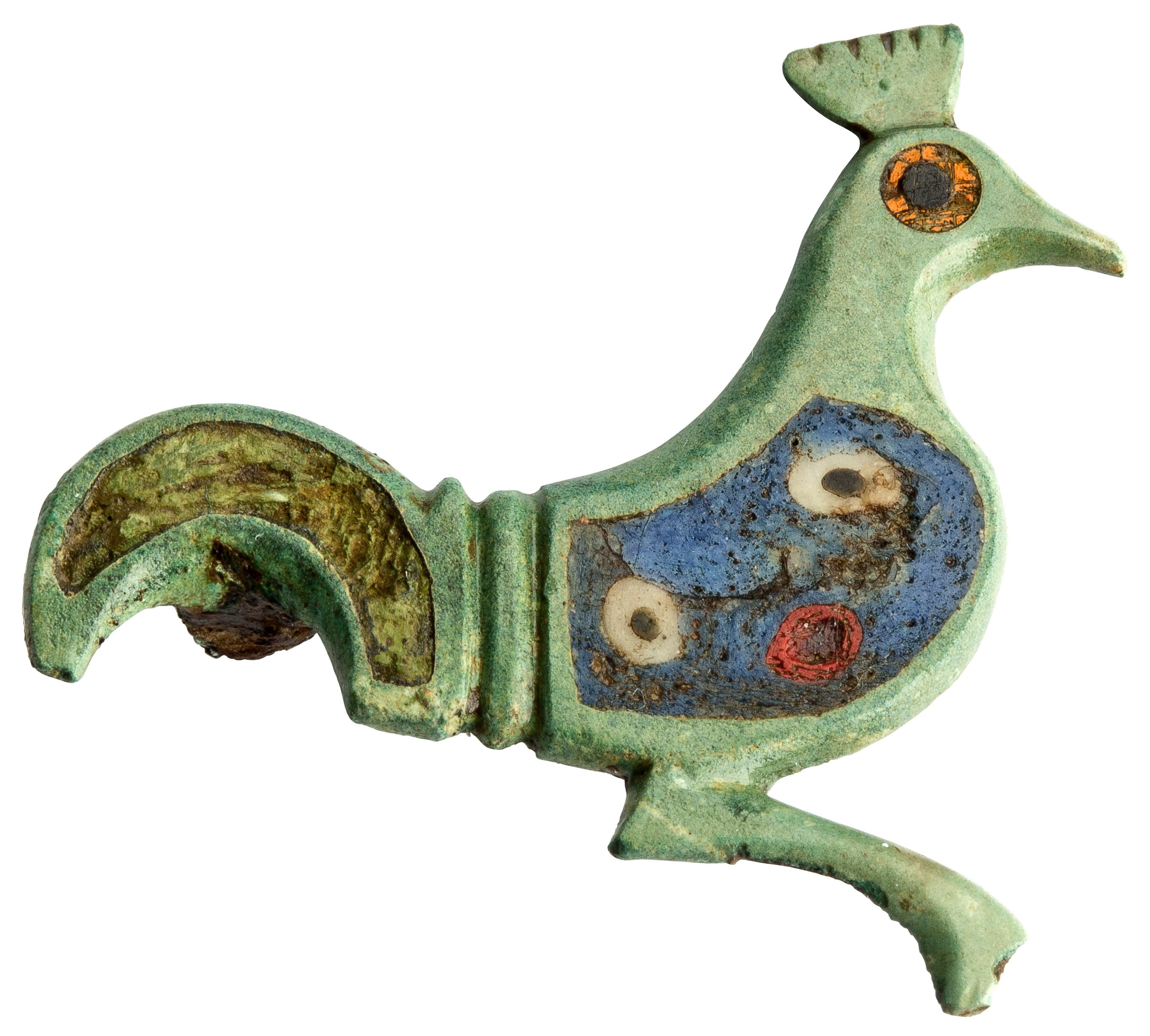 Dierfibula in geëmailleerd brons in de vorm van een haan, 100 tot 200 NC, vindplaats: Lauw, Tillerweg, 1991, omgeving van oven A en B, collectie Gallo-Romeins Museum Tongeren, GRM 10435